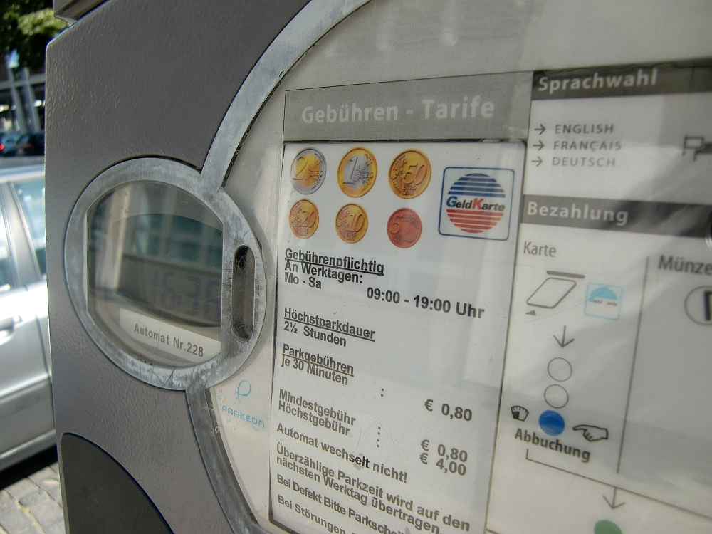 Parkuhr mit Geldkarte-Akzeptanz